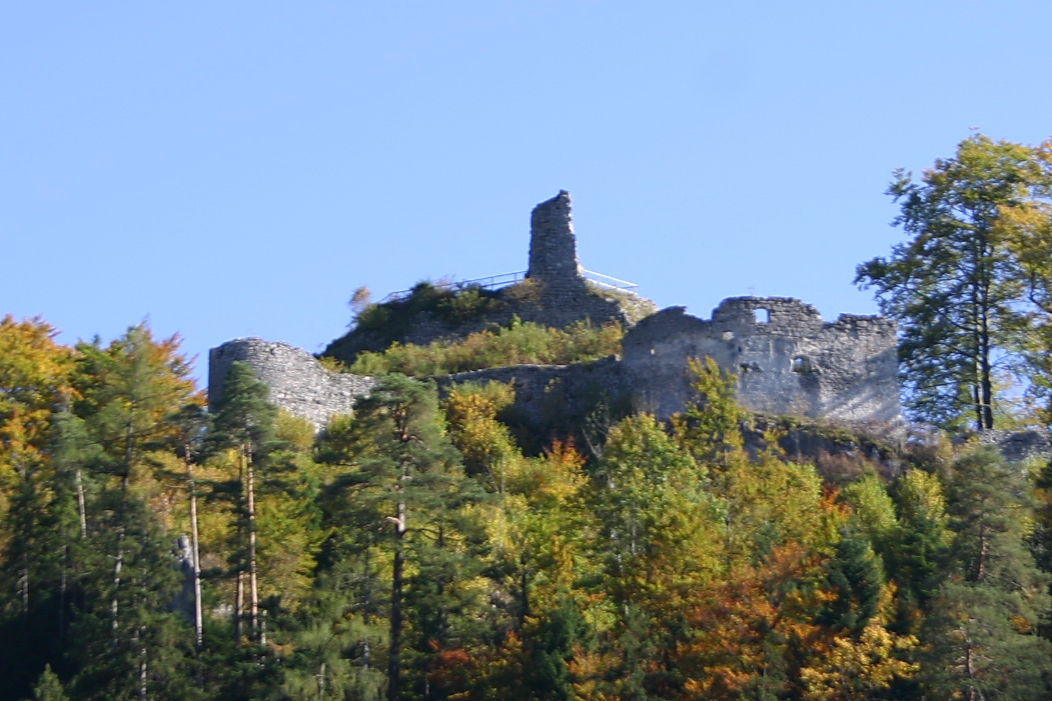 Burgruine Hohenberg